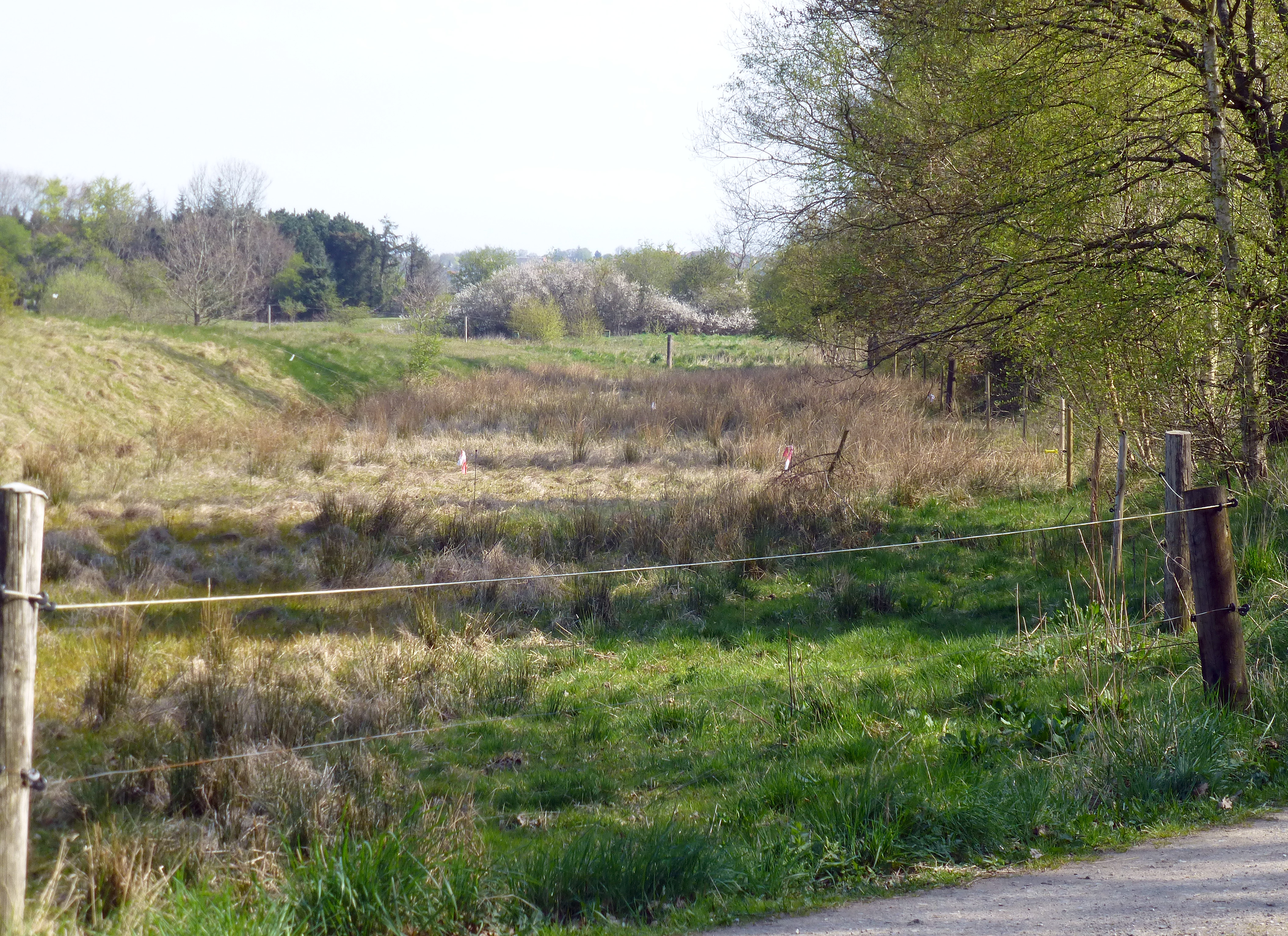 Christian IIIs kanal er en 5.400 m lang og 4-5 m bred kanal, der forbinder den opstemmede Nørreå med voldgravene omkring Randers. Kanalen tager sin begyndelse ved Fladbro vest for Randers